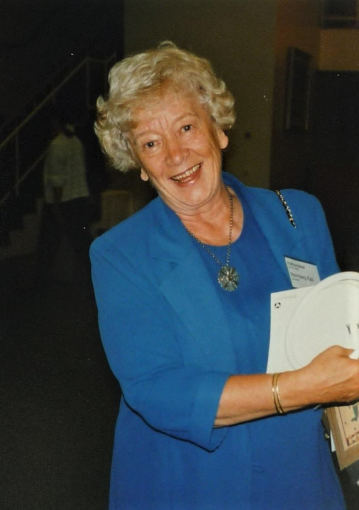 Raili Malmberg Kalevalaiset Naiset ry:n vuosikokouksessa vuonna 1995.